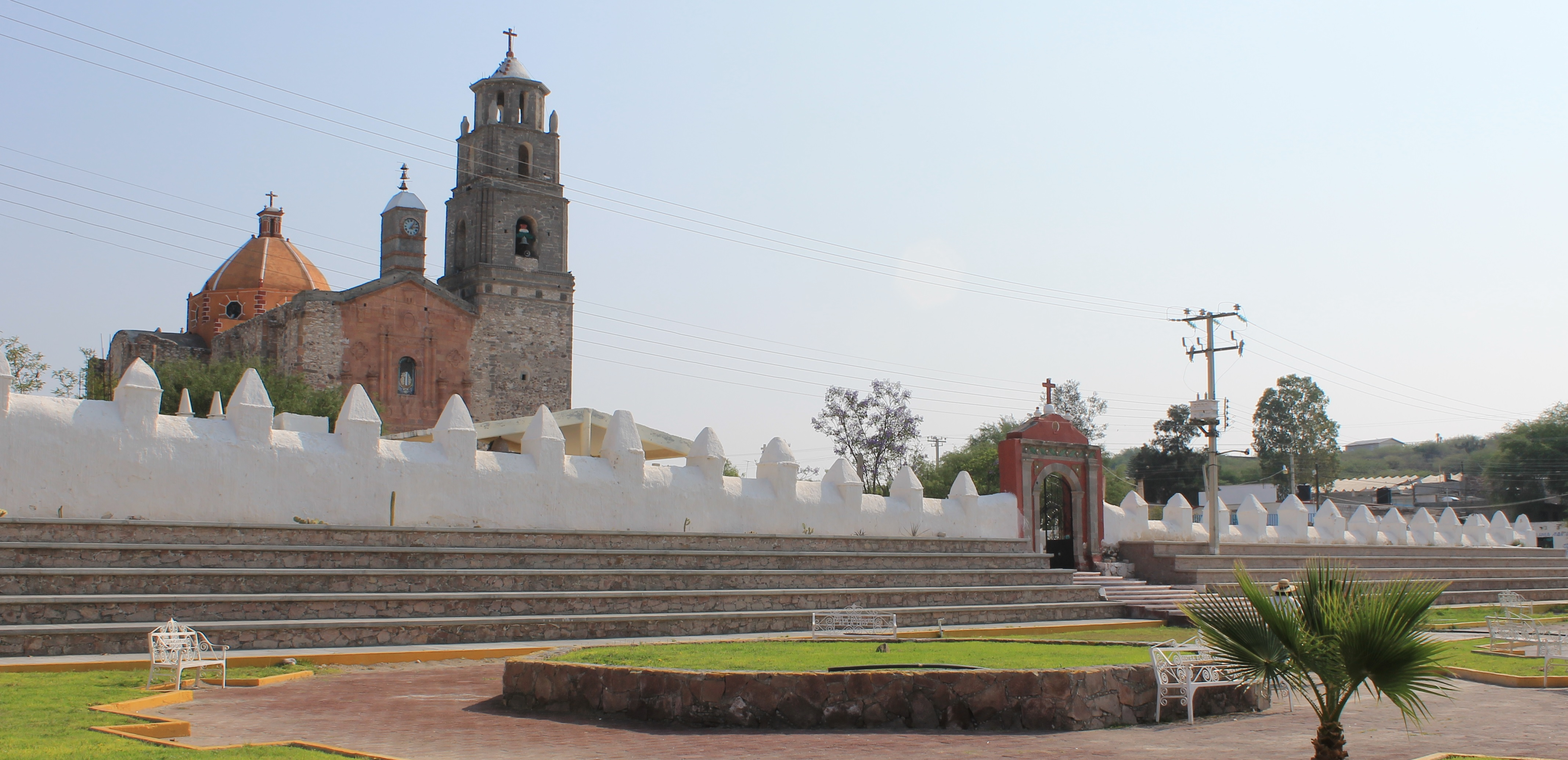 Los Remedios Ixmiquilpan Hidalgo México